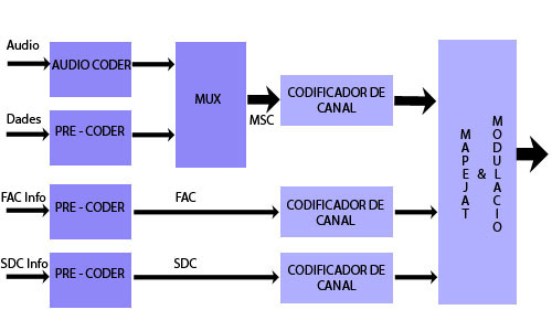 Diagrama de blocs d'un transmissor DRM